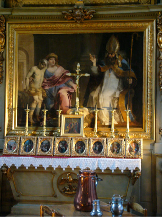 Altarbild im Saal Saint Hugues im Hôtel-Dieu in Beaune Für das abfotografierte Bild gilt: Für die hier gezeigte Datei